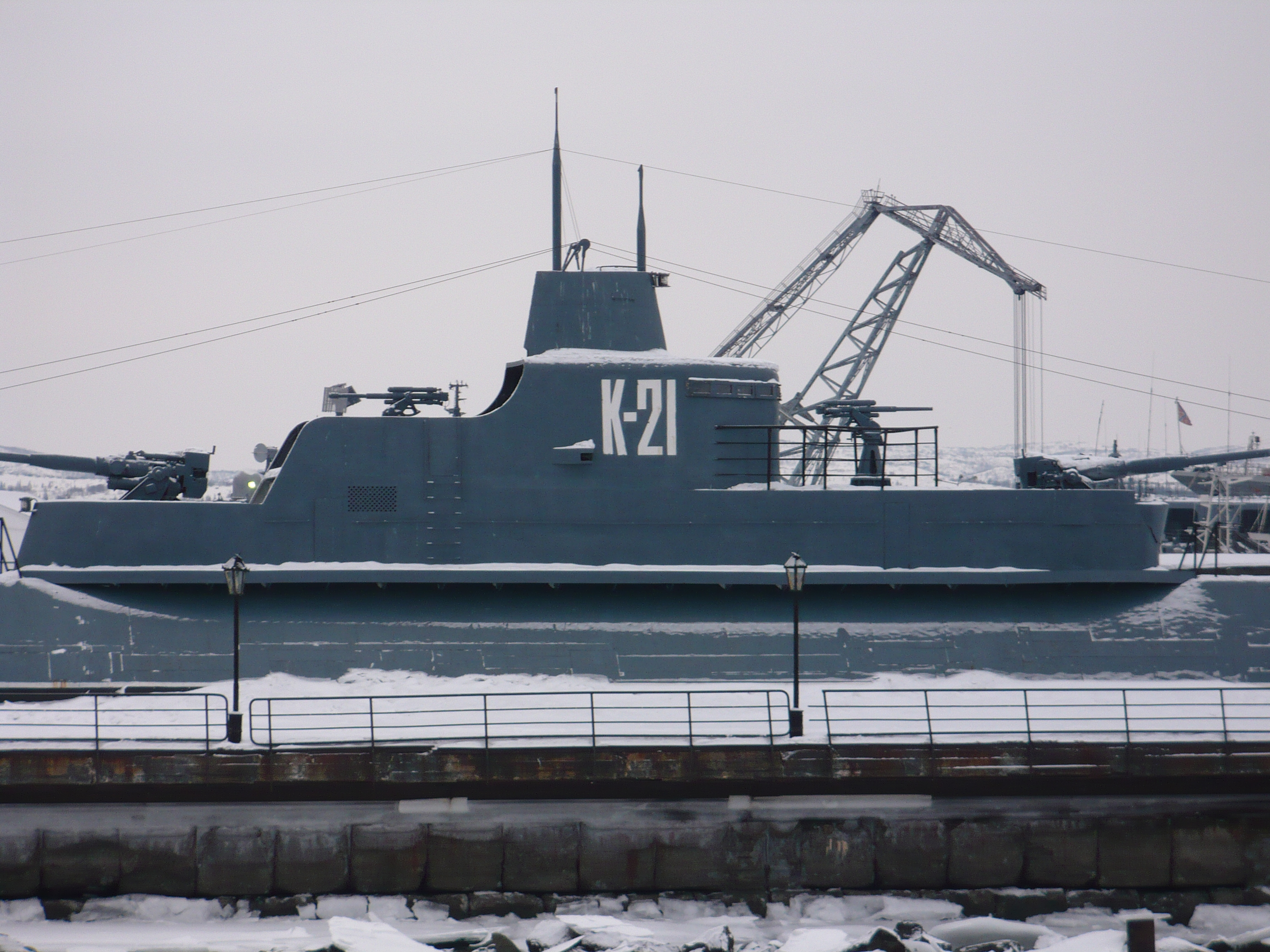 K-21 (submarine, 1940)